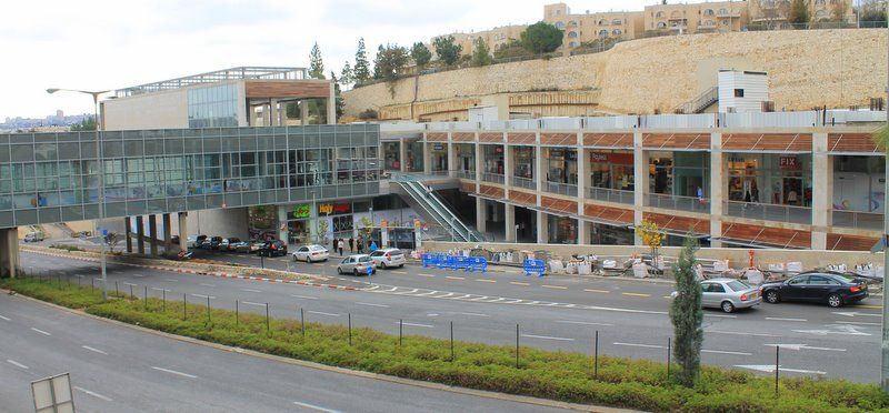 קניון רמות